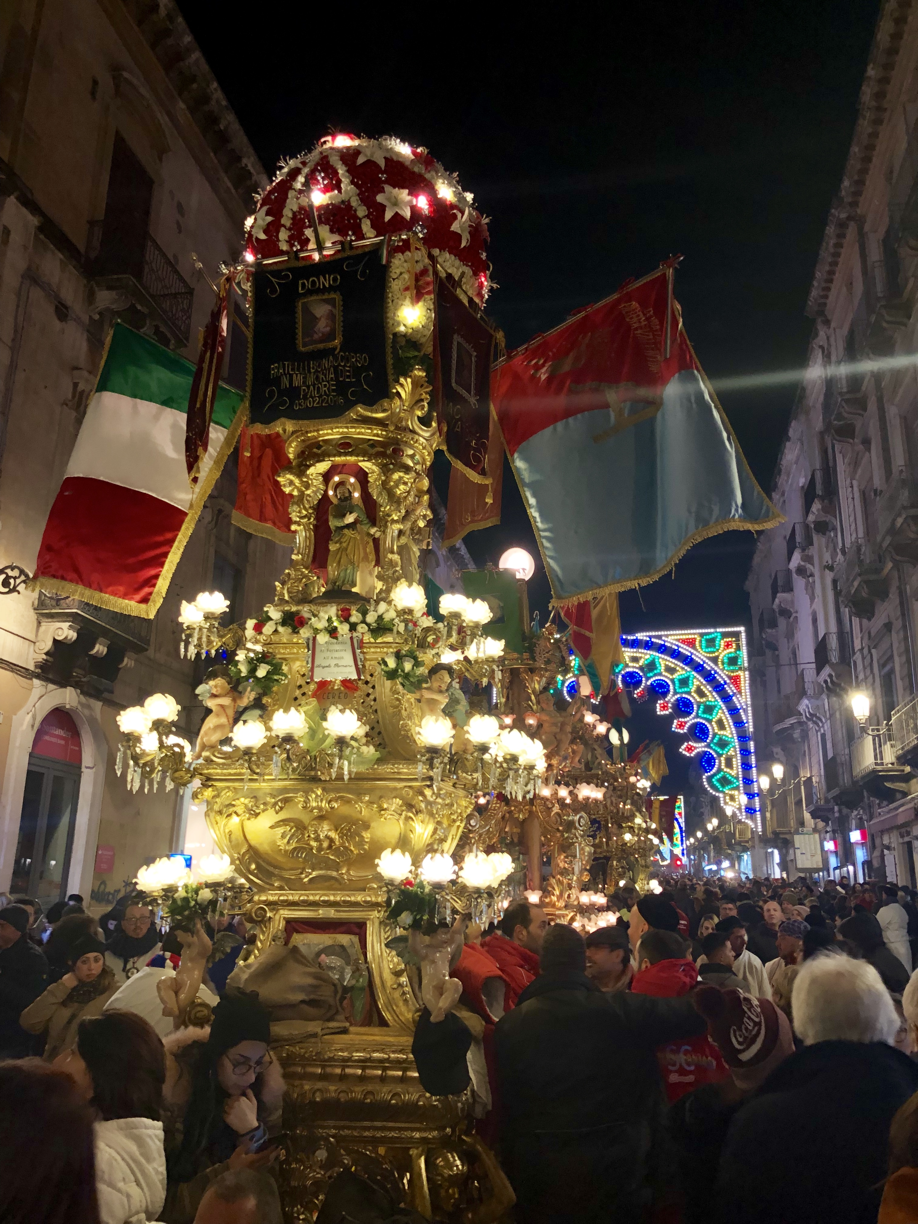 Festa di Sant'Agata 2019